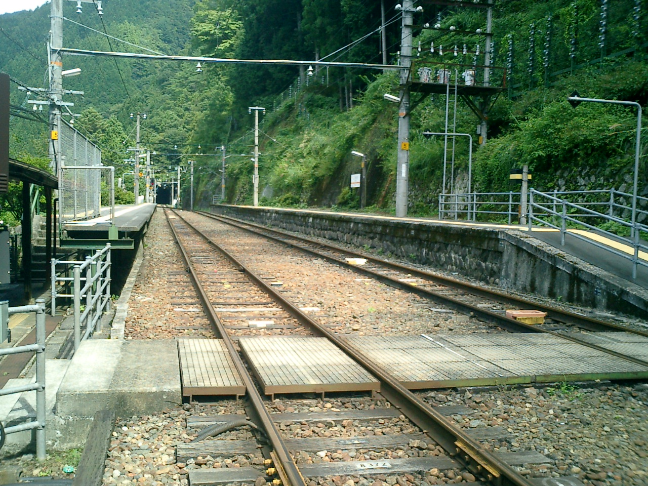 Kowada Station, Tenryu-ku, Hamamatsu, Shizuoka, Japan